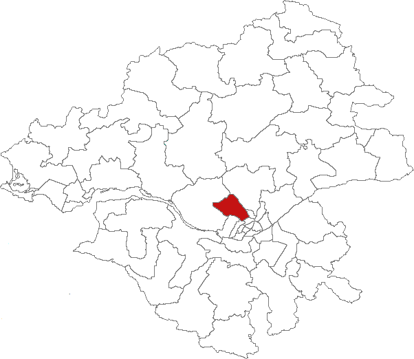 Carte de localisation du canton d'Orvault (France, Loire-Atlantique)